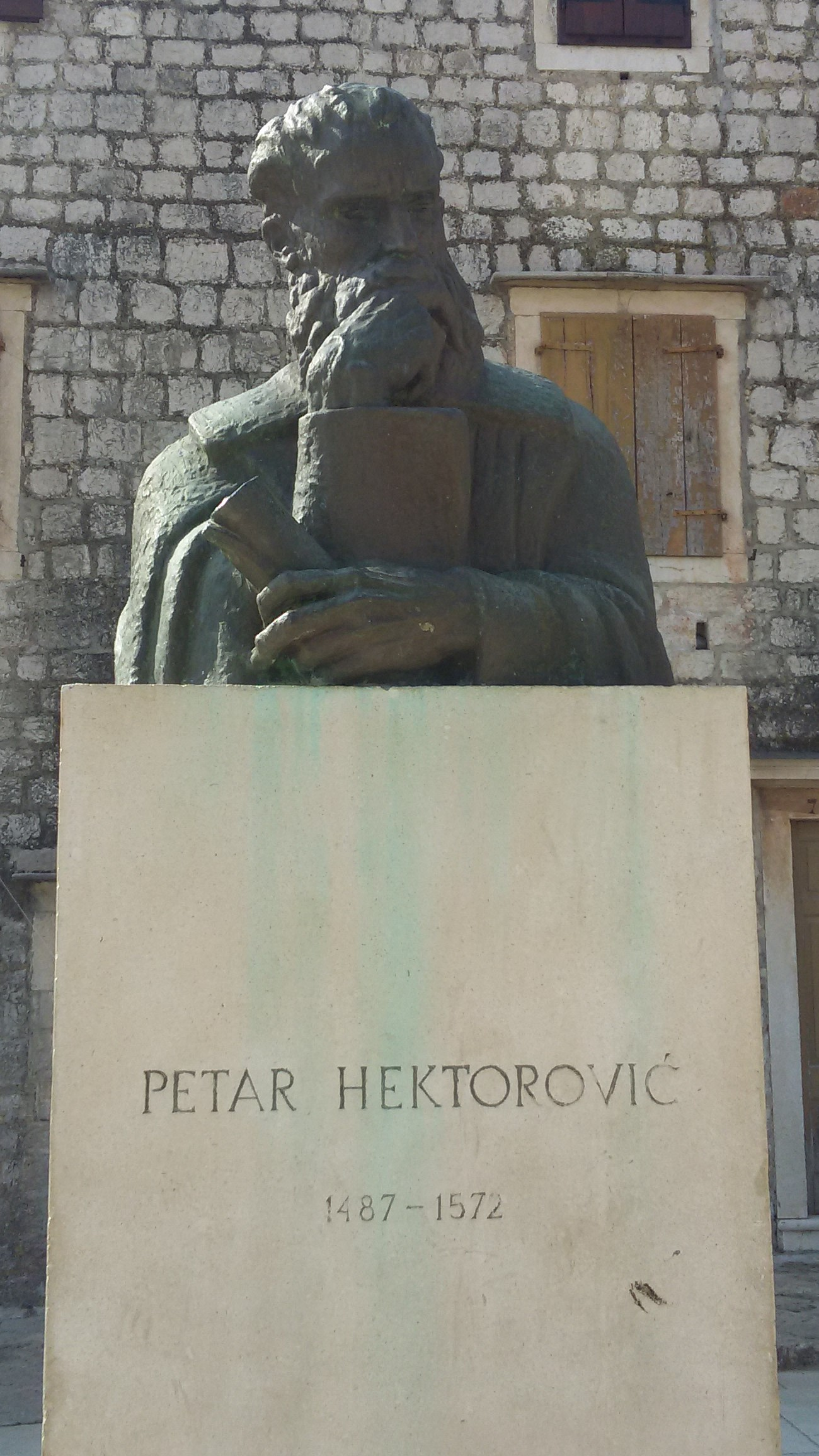 Estatua de Petar Hektorović